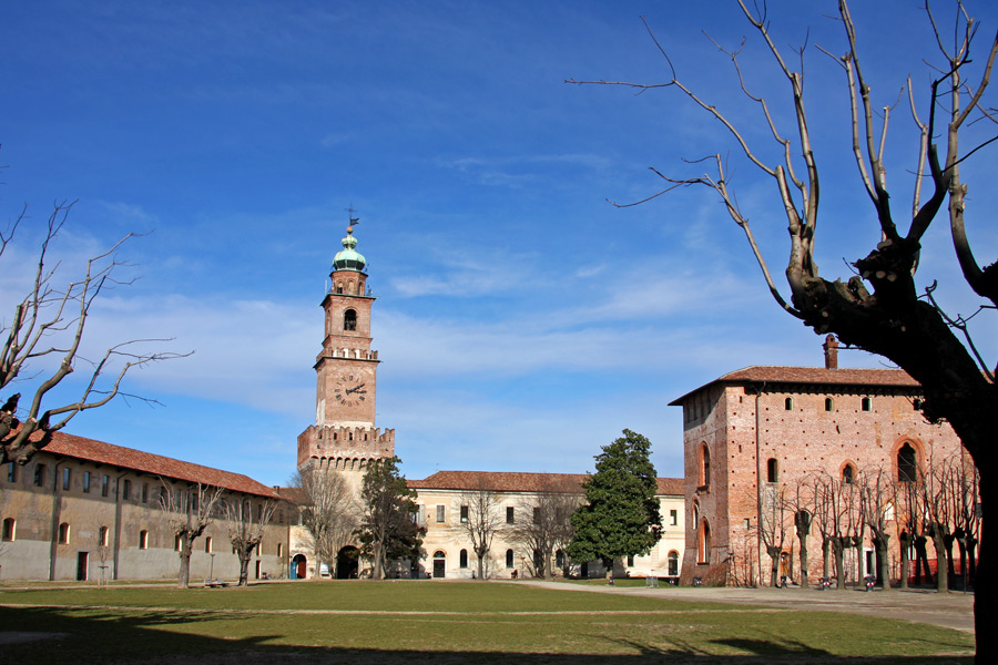 Cortile del castello di Vigevano (PV) con, da sinistra a destra, la terza scuderia, la torre del Bramante, l'ala ottocentesca ed il maschio.